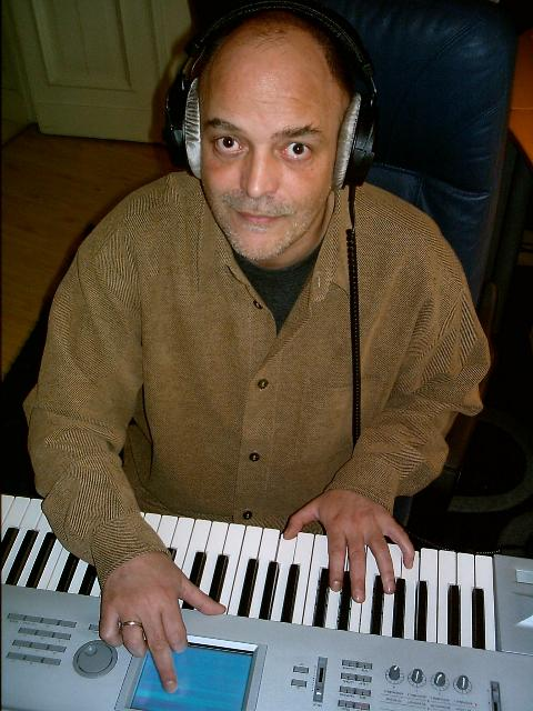 Martin Schubert (2010), Komponist, Arrangeur, Audioproduzent und Sprecher aus Berlin